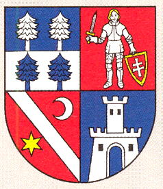 Herb Kraju Bańskobystrzyckiego